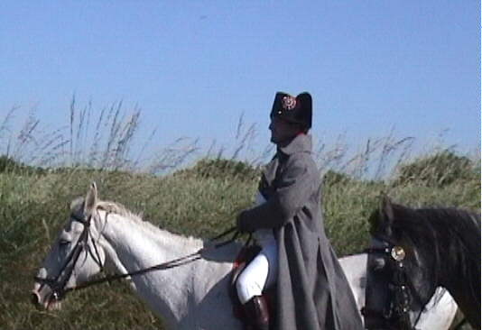 Photo prise par Fistos le 18 juin 2005 lors de la reconstitution de la bataille